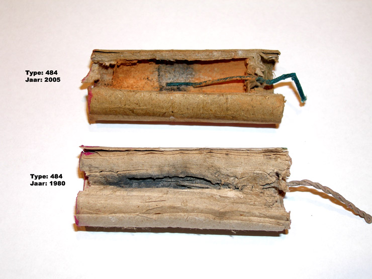 Verringerung von Wandstärke und Schwarzpulvergehalt in Chinaböllern.